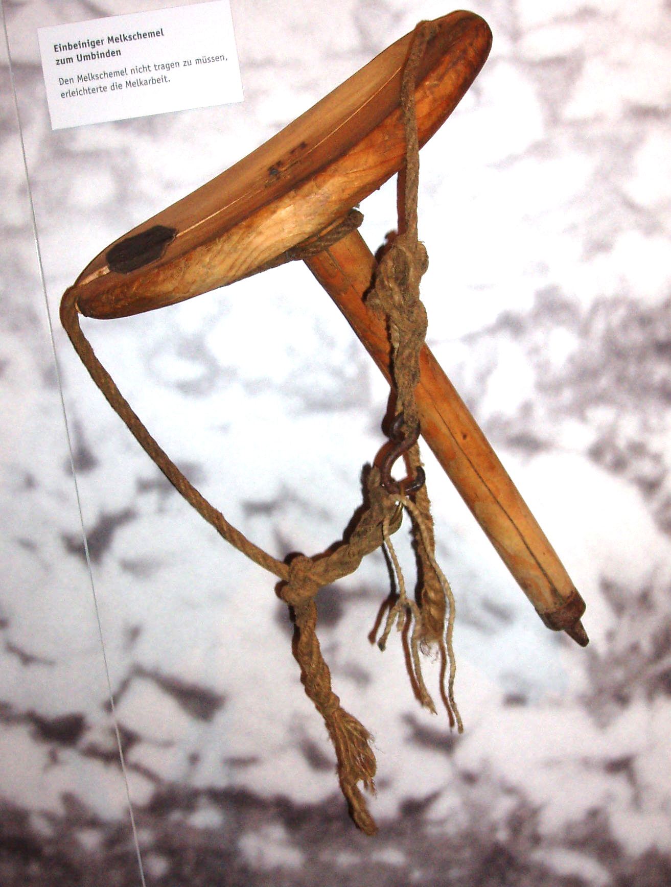 einbeiniger Melkschemel